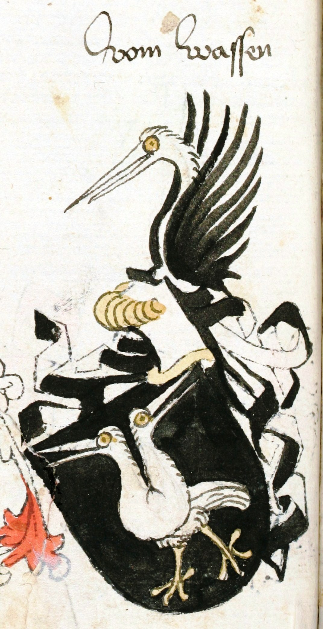 Wappen der Herren von Wasen („vom Wassen“), einem ritterständischen Adelsgeschlecht, das im Maingau und im Umfeld der Stadt Aschaffenburg begütert war.